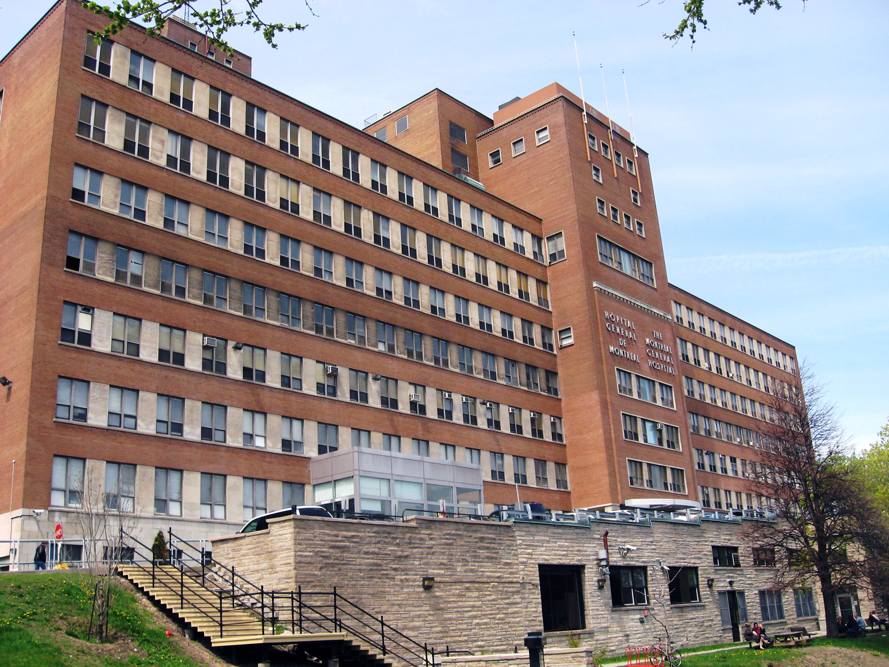 L'Hôpital Général de Montréal, vu depuis la Côte-des-Neiges